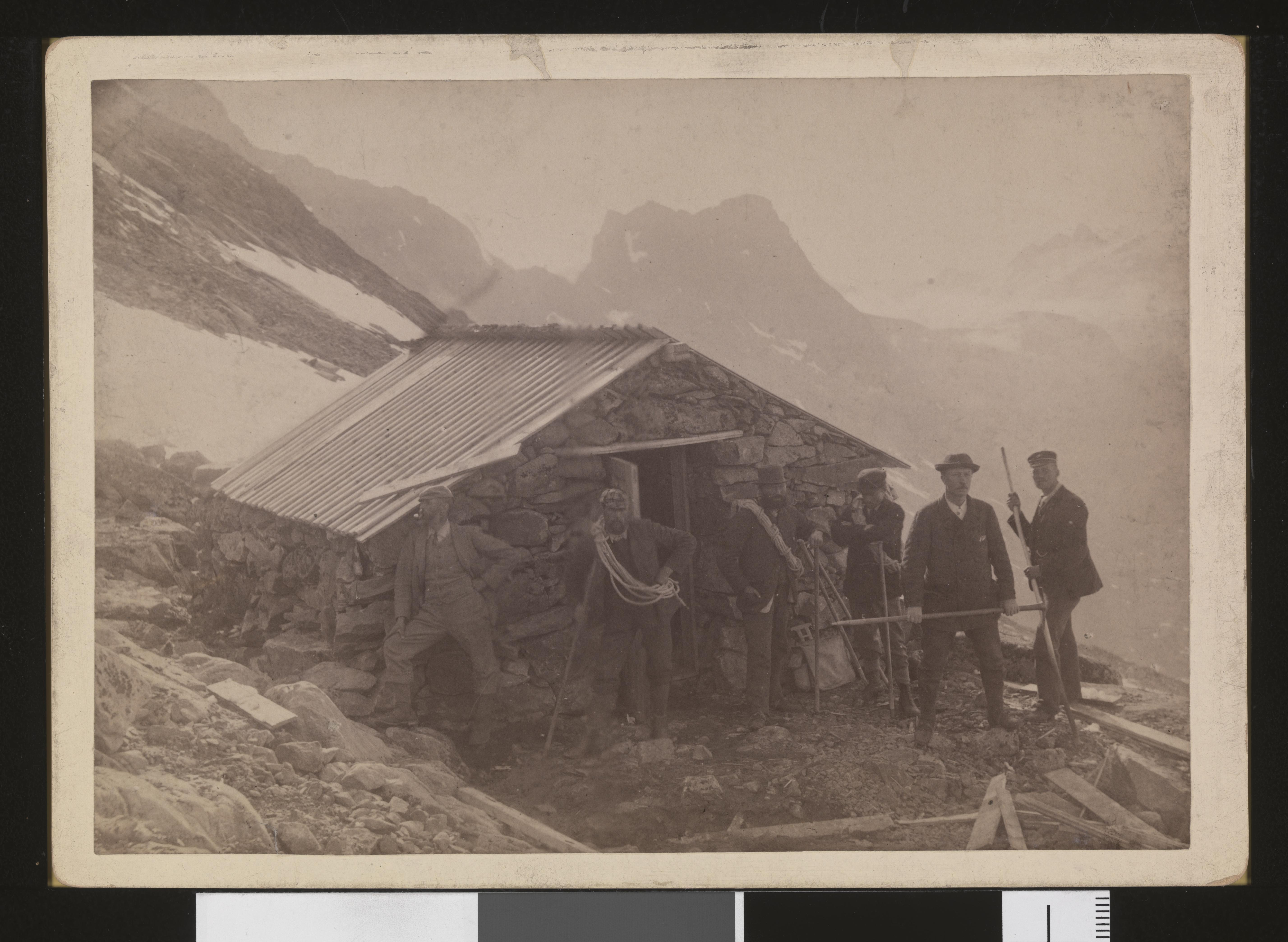 Bildet er hentet fra Nasjonalbibliotekets bildesamling. Anmerkninger til bildet var: Tittel hentet fra bildets baksidetekst på komponentnr 1. Baksidetekst på komponentnr 1: "Ved Skagastölhytten, ca 5600', den 22/7 94. I Mellemgrunden tilvenstre Nordlige Maradalstinder, 6900', og derefter Sydlige Maradalstind. I Baggrunden tilhøjre skimtes Stölnaastinder, 6600', og Koldedalstinder, 6515'. C. Lange phot." Jotunheimen, Luster, Sogn og Fjordane